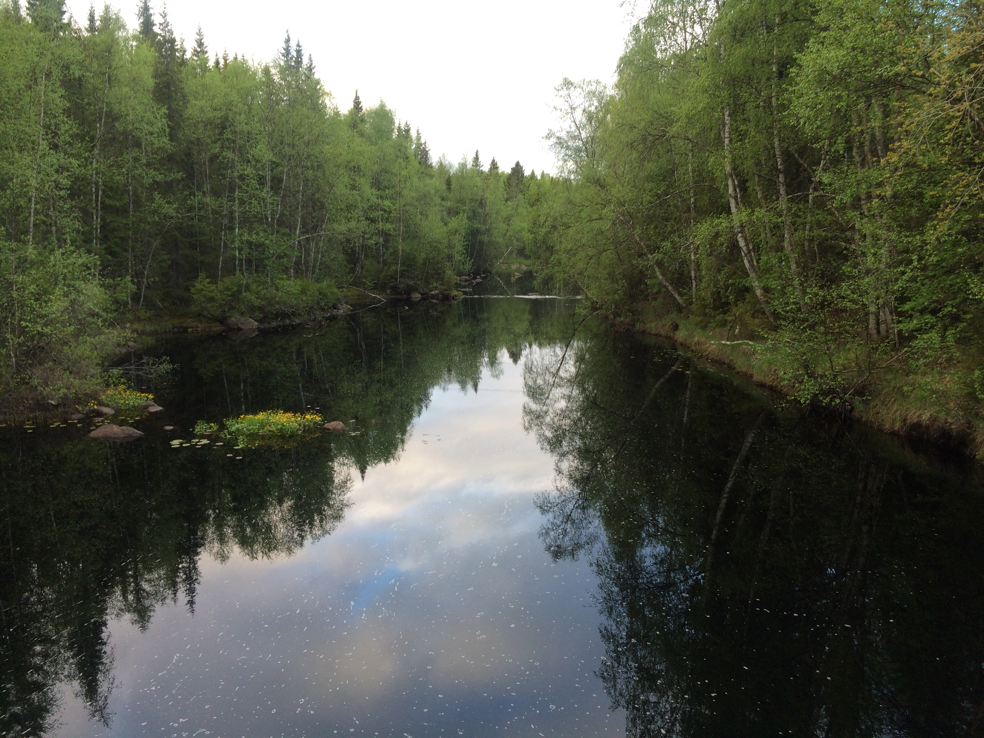 Березовка (река, впадает в Белое море)